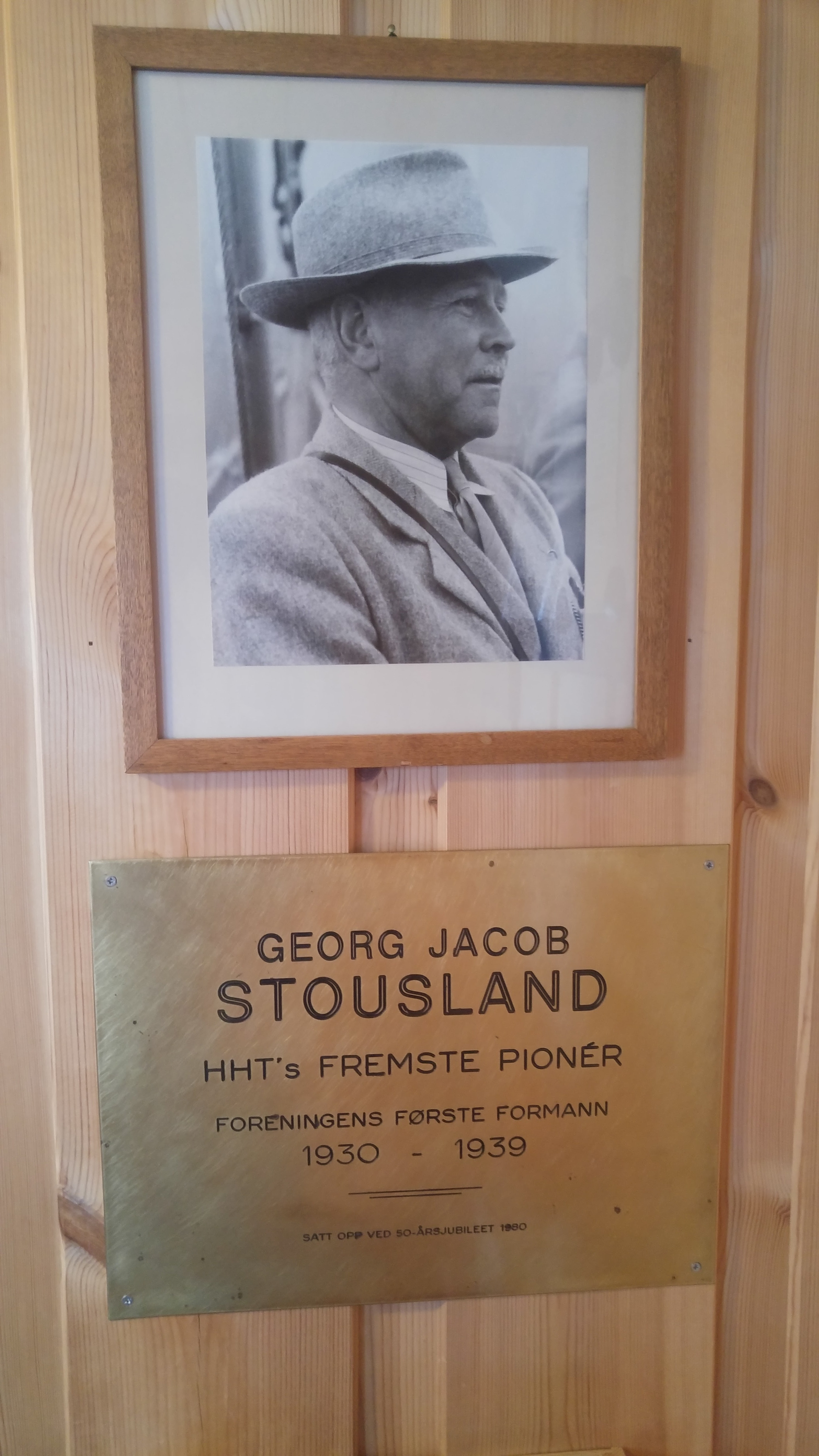 Georg Jacob Stousland. Bilde og minneplankett på hytta Mållia (Hamar og Hedemark Turistforening).